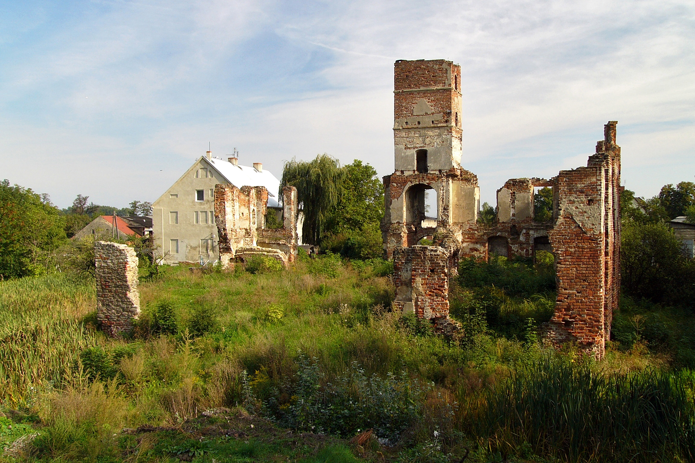 Ruiny zamku z XVI w. w miejscowości Smolec, gmina Kąty Wrocławskie